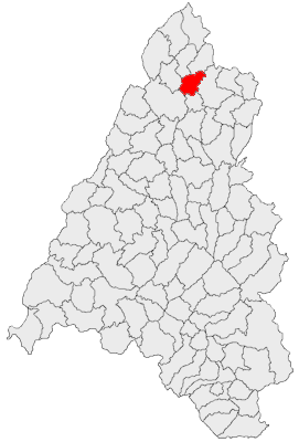 Categorie:Hărţi ale judeţului Bihor